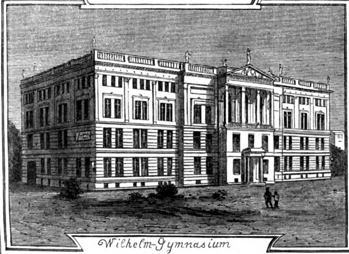 Ansicht des Königlichen Wilhelm-Gymnasiums in Berlin, 1866.